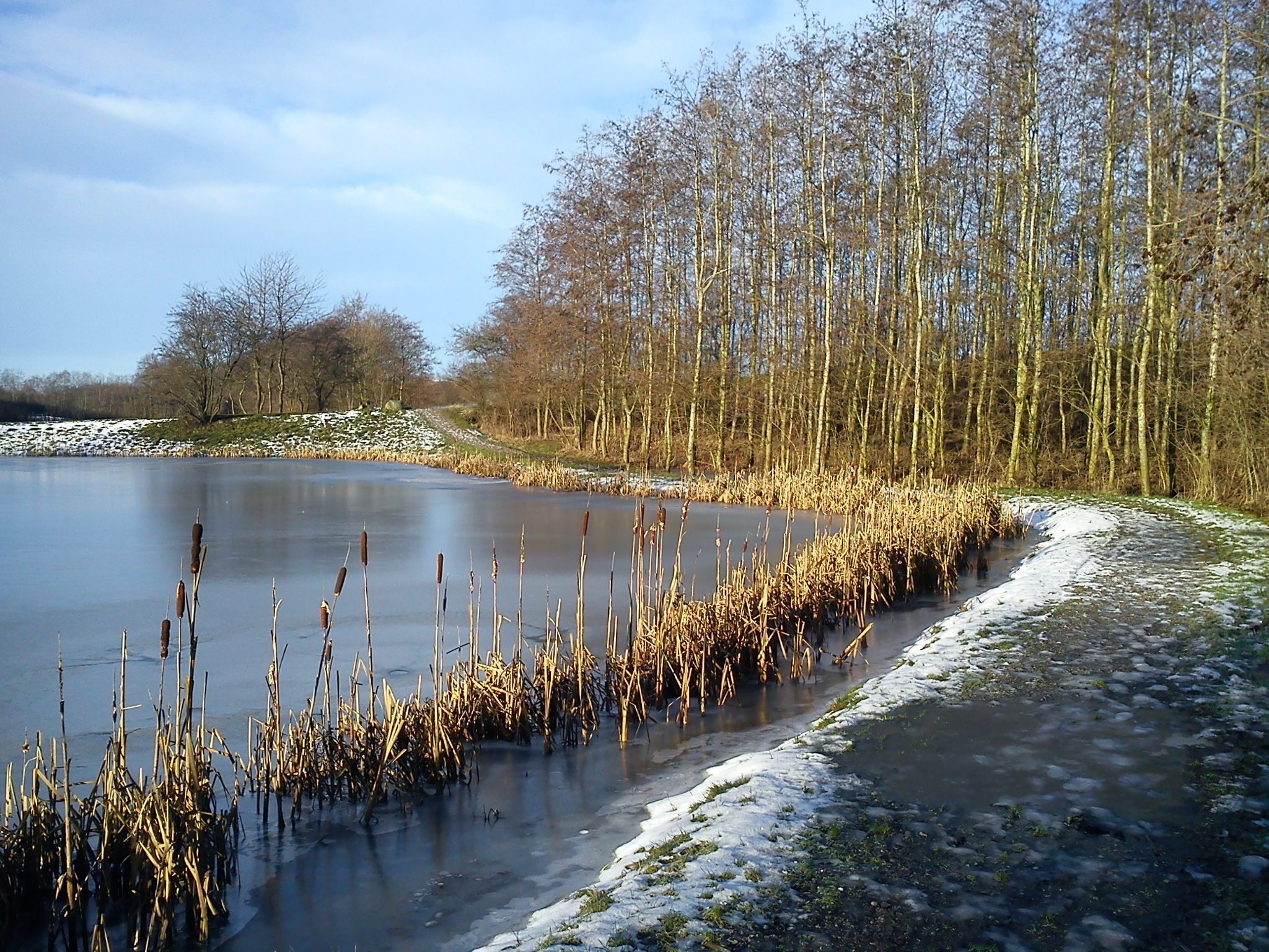 Ét af to større regnvandsbassiner i den nordøstlige del af Eldalen. Bassinerne ligger i udkanten af Brendstrup Skov ved erhvervsparken omkring Bredskifte Alle.